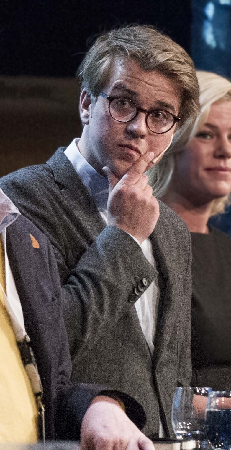 Medvirkende: Mathias Fischer (Bergens Tidende), Bernt Olufsen (Schibsted Media Group), Jette . Christensen (Ap), Ib Thomsen ( rP), Frank Aarebrot (UiB). Moderator: Arill Riise